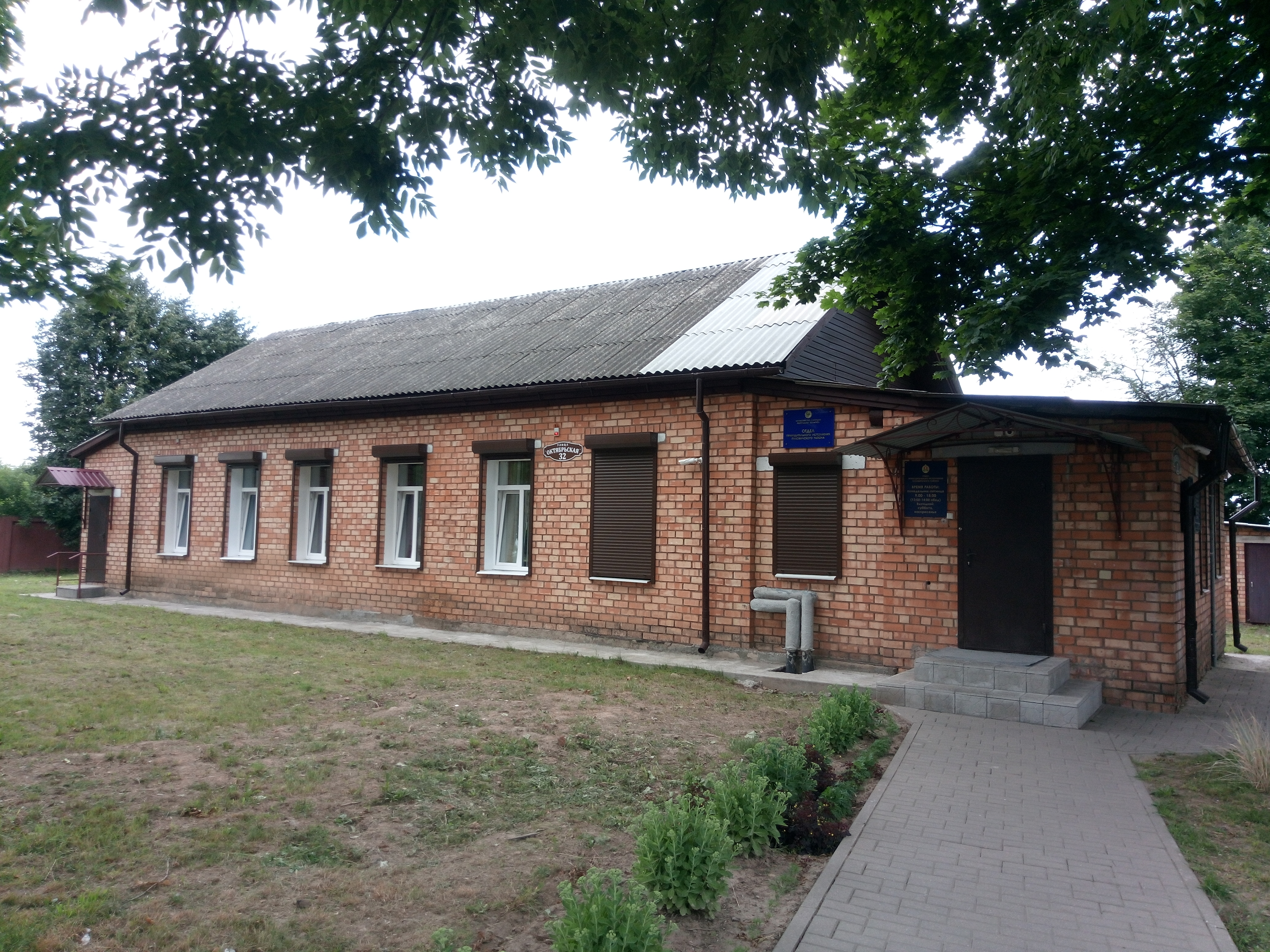 Дом дзе правёў дзяцінства І. М. Лучанок